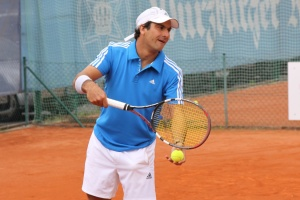 interclub europa